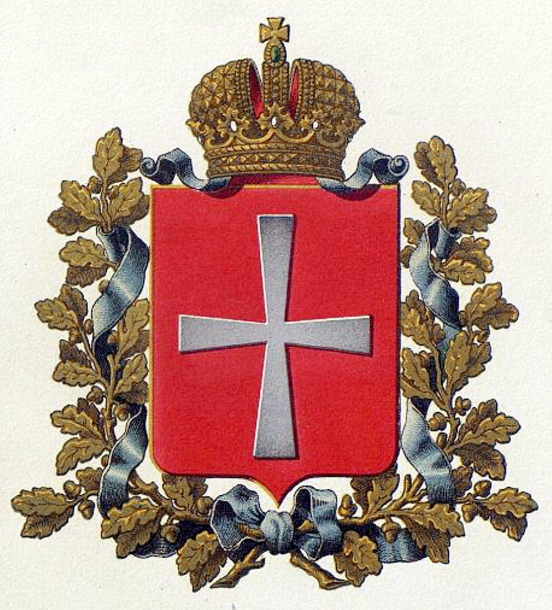 Official Russian Empire coat of arms Volyn Governorate. Герб Российской Империи Волынской губернии в Гербовнике МВД. Утверждён Императором Всероссийским Александром Вторым.